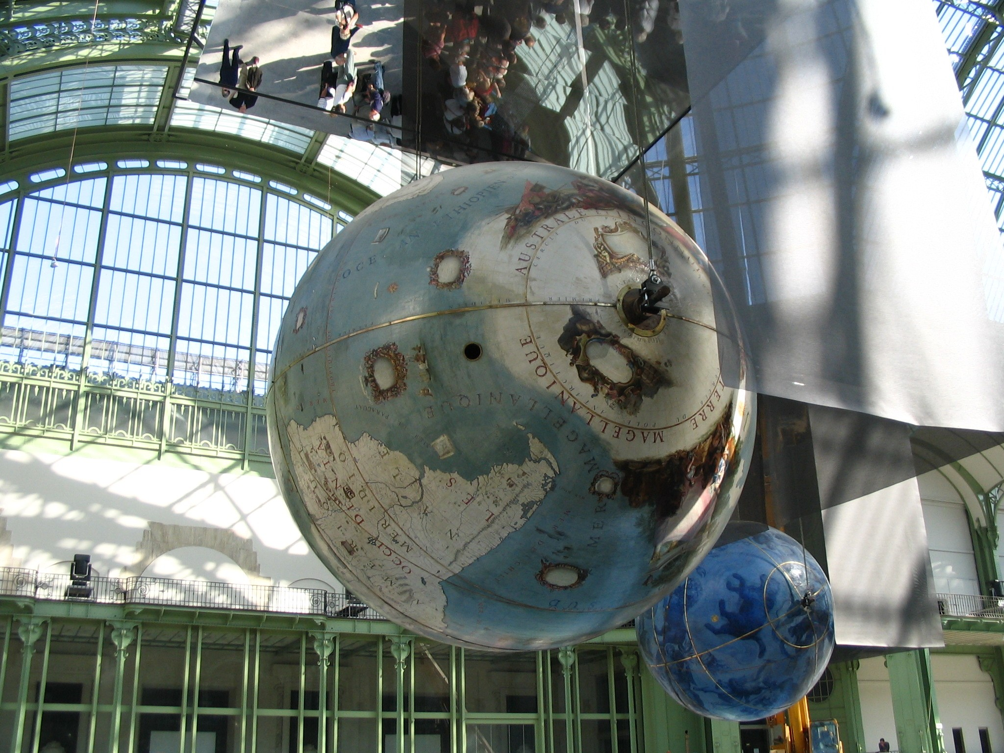 photo perso des Globes de Coronelli prise au Grand Palais le 22 septembre 2005.